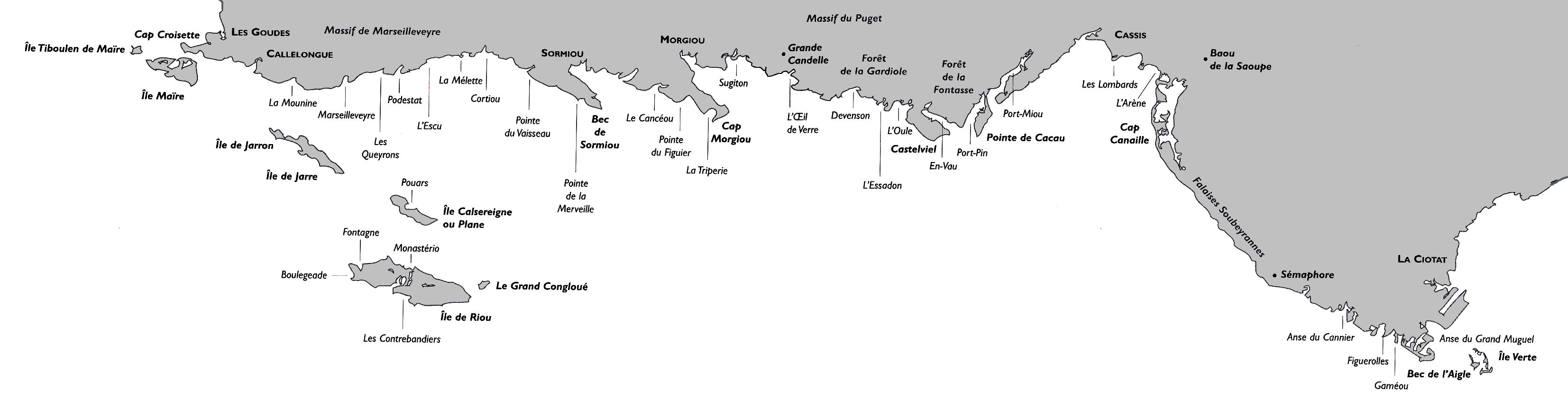 Carte des Calanques entre Marseille et La Ciotat